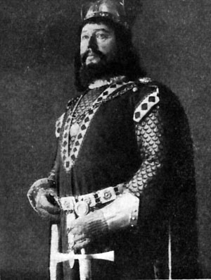 Carl August Söderman (sångare) as Bengt Gautesön in the opera Gillet på Solhaug